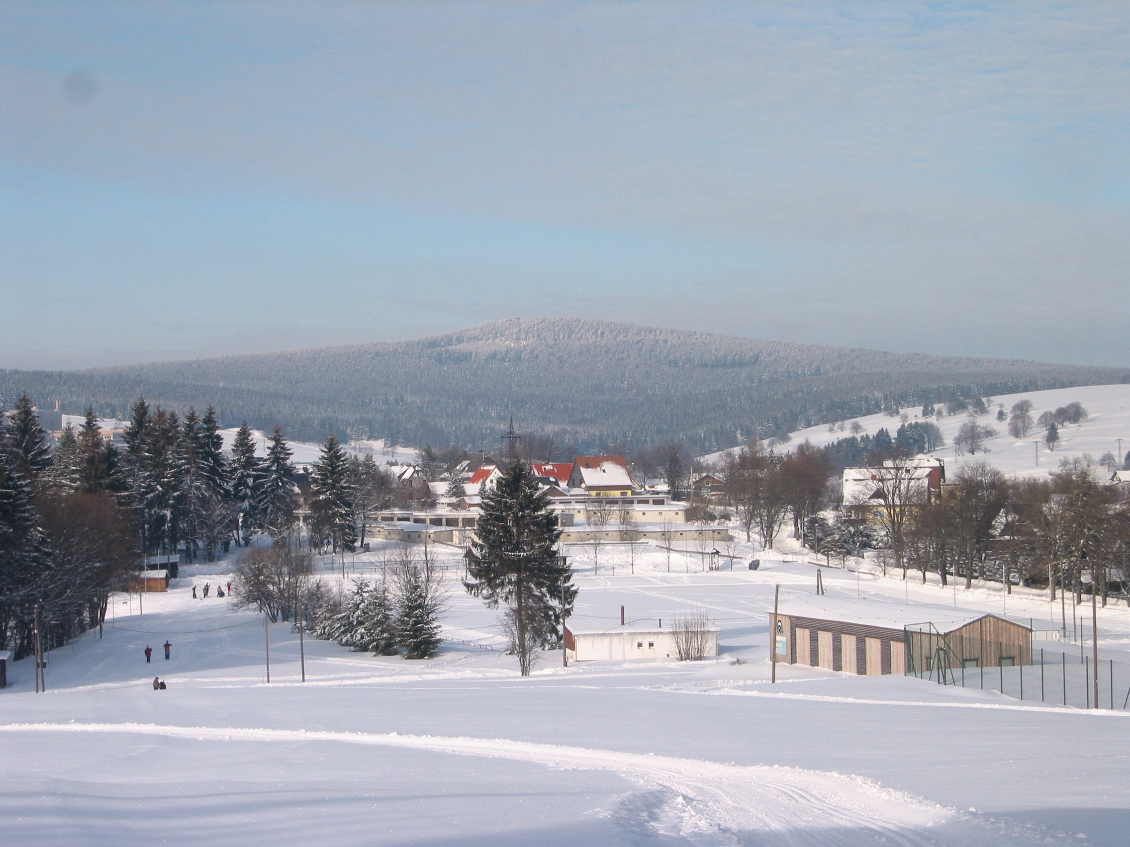 Großer Finsterberg, 944 m ü. NN., Thüringer Wald, Blick vom Hückel bei Schmiedefeld am Rennsteig, im Vordergrund ein Teil der Ortschaft Schmiedefeld am Rennsteig mit dem auf ca. 710 m ü. NN gelegenen Sportplatz der zugleich Zieleinlauf des Guths-Muths-Rennsteiglauf ist